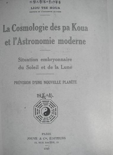 中文（台灣）: 法文版的八卦宇宙論與現代天文封面